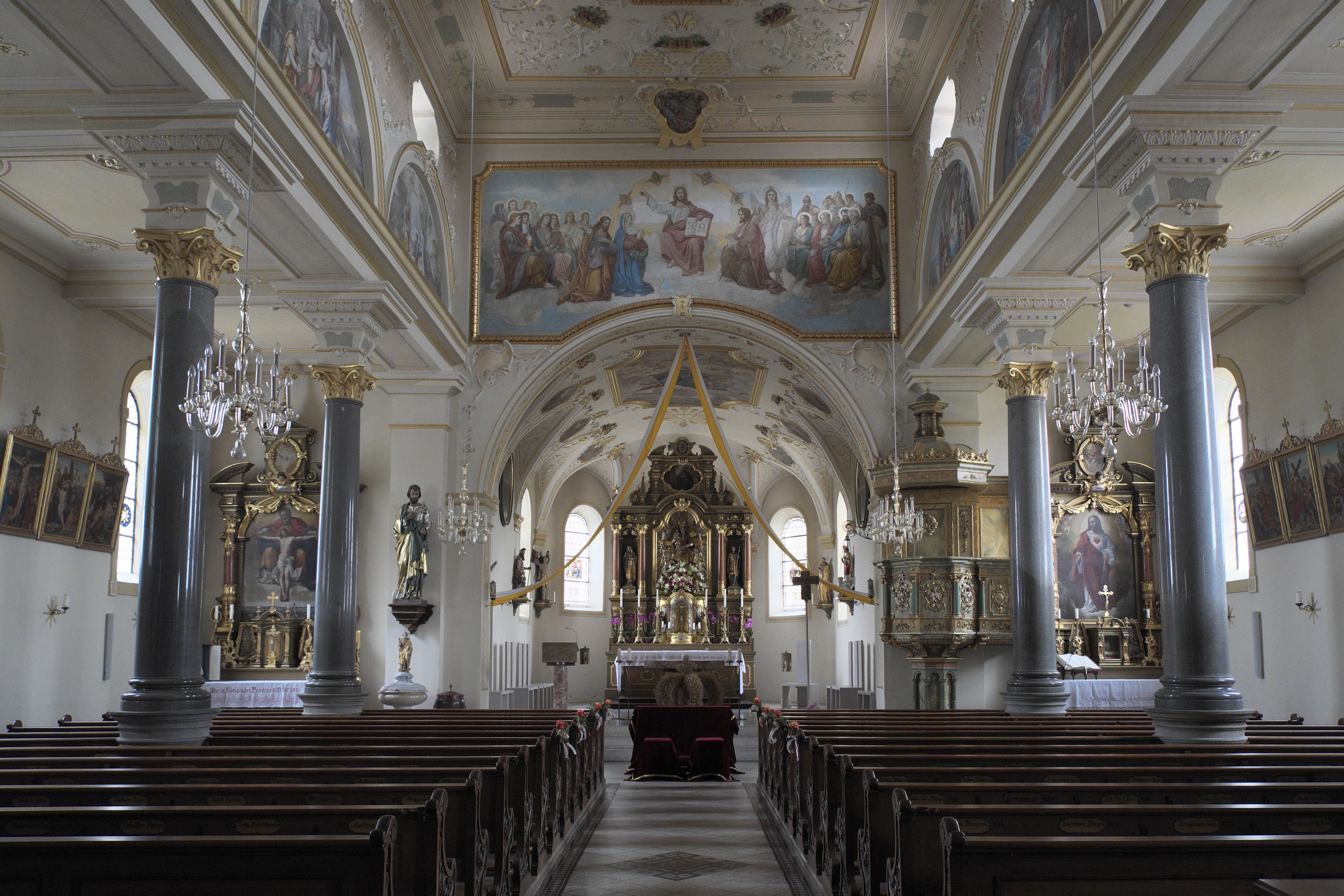 Katholische Pfarrkirche St. Benedikt in Odelzhausen im Landkreis Dachau (Bayern/Deutschland), Innenraum